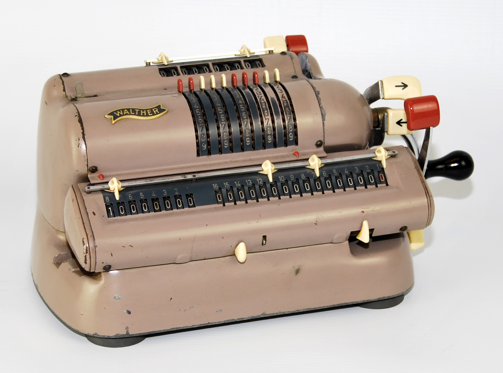 Walther WSR 160 Rechenmaschine, produziert von 1956 bis 1968